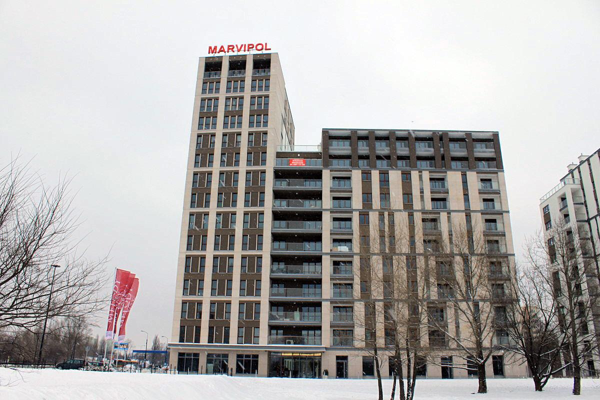 Fragment zabudowy Melody Park